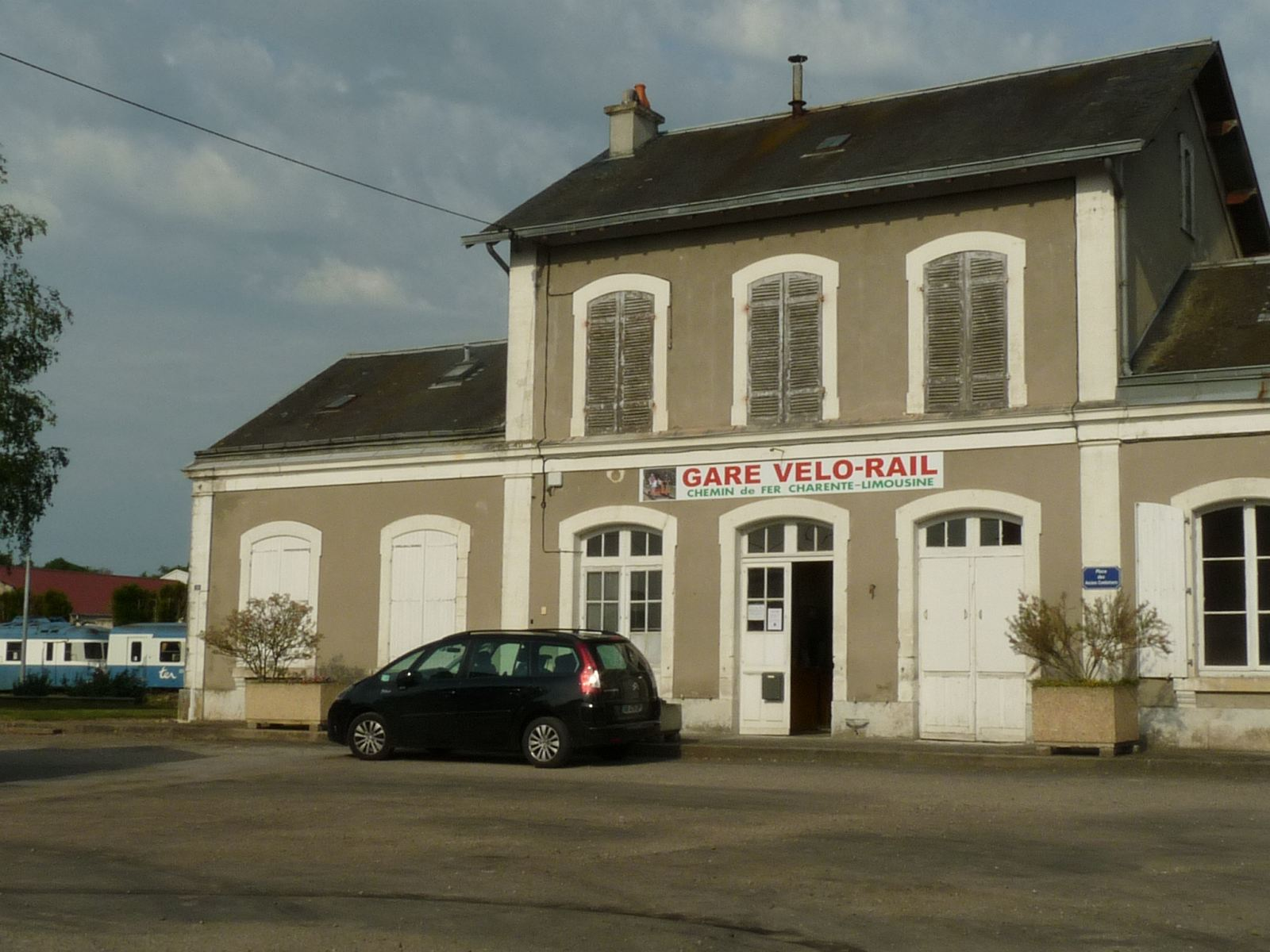 Gare de Confolens (Charente, France)